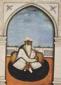 Sham Singh Attariwala